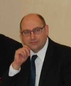 JIří Holeček (2014)